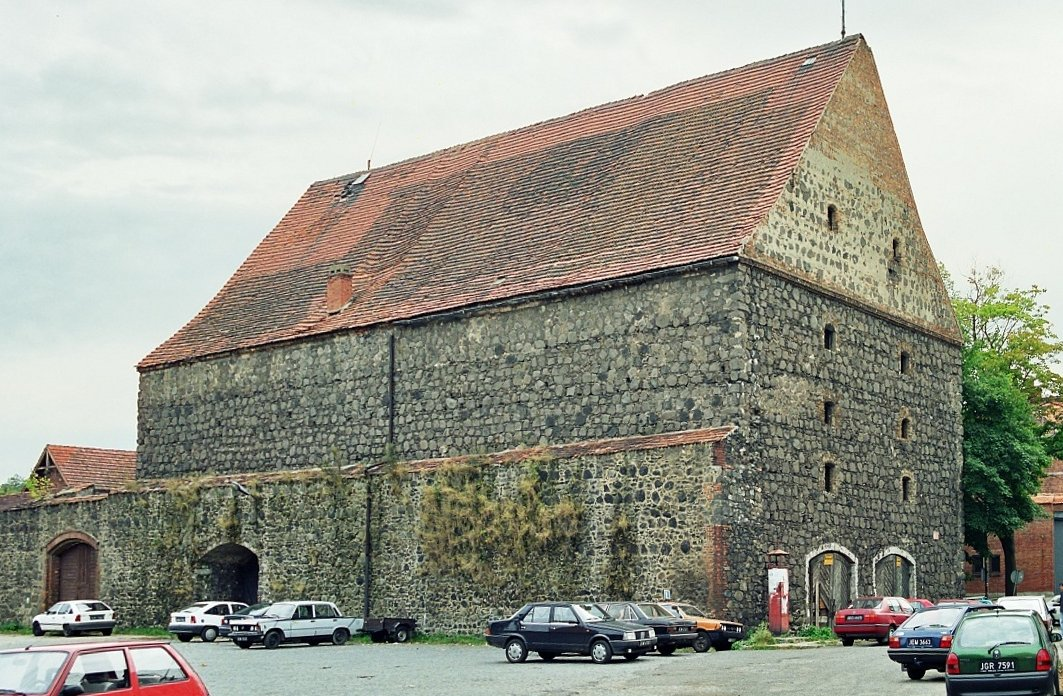 Lubań - Dom Solny z XVI w.